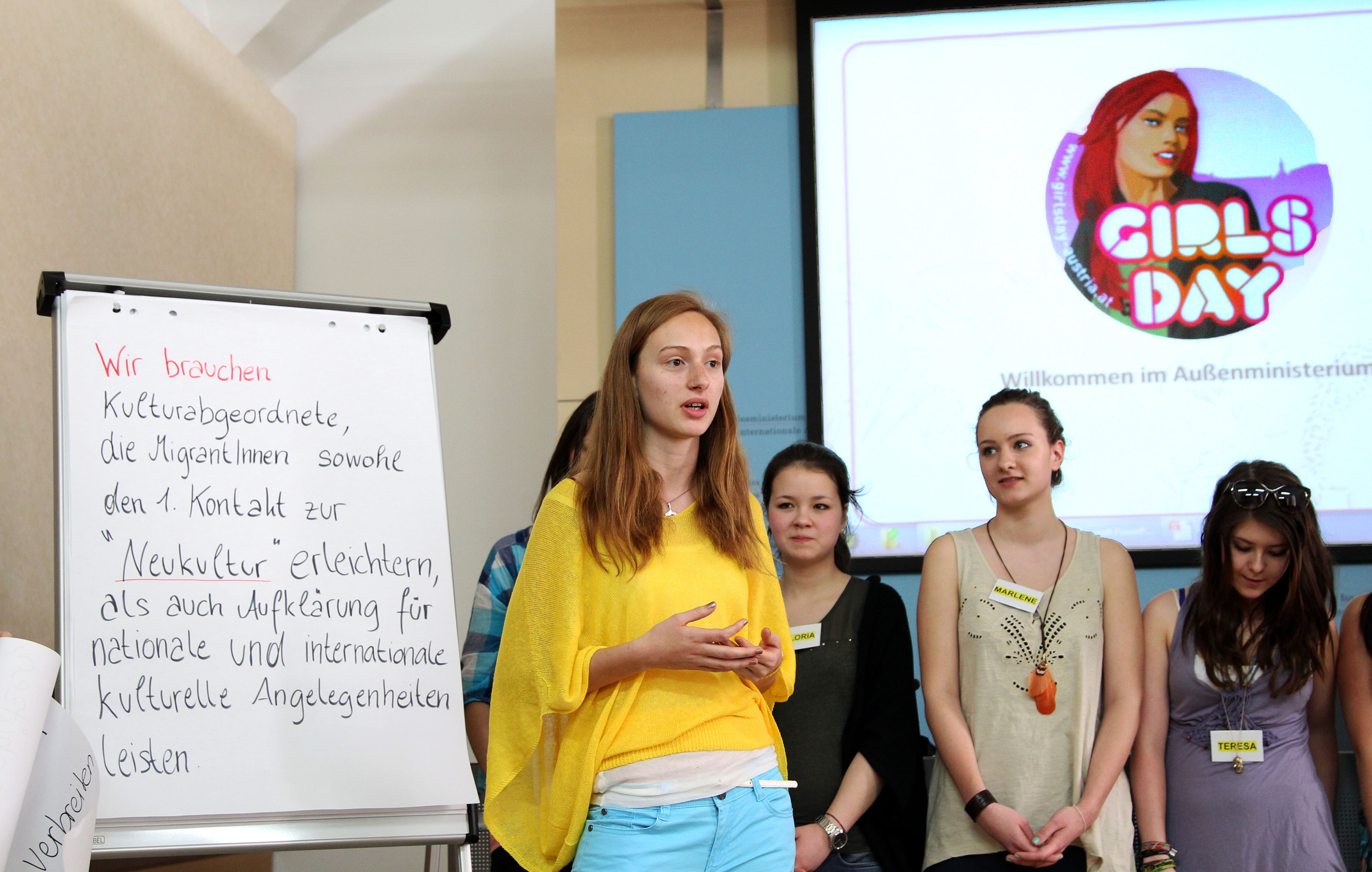 Donnerstag, den 25. April 2013 fand in den Bundesministerien der Girls Day statt, bei dem sich Schülerinnen über Arbeit und Chancen von Frauen im öffentlichen Dienst informieren konnten. Foto: Mahmoud